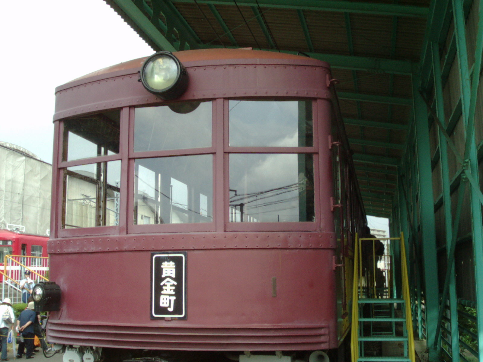 京急ファインテック久里浜事業所 で投稿者が撮影